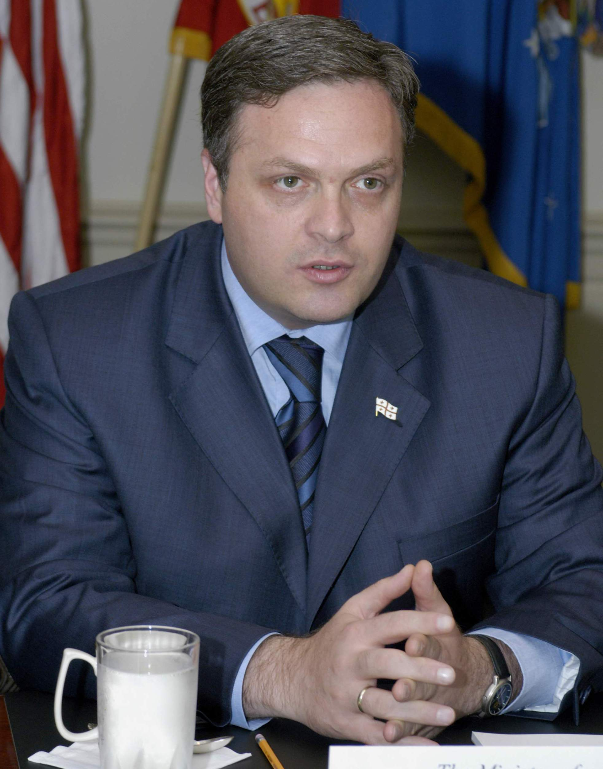 Bild Giorgi Baramidse